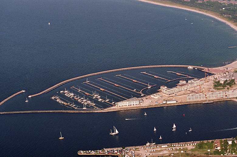 Warnemünder Yachthafen